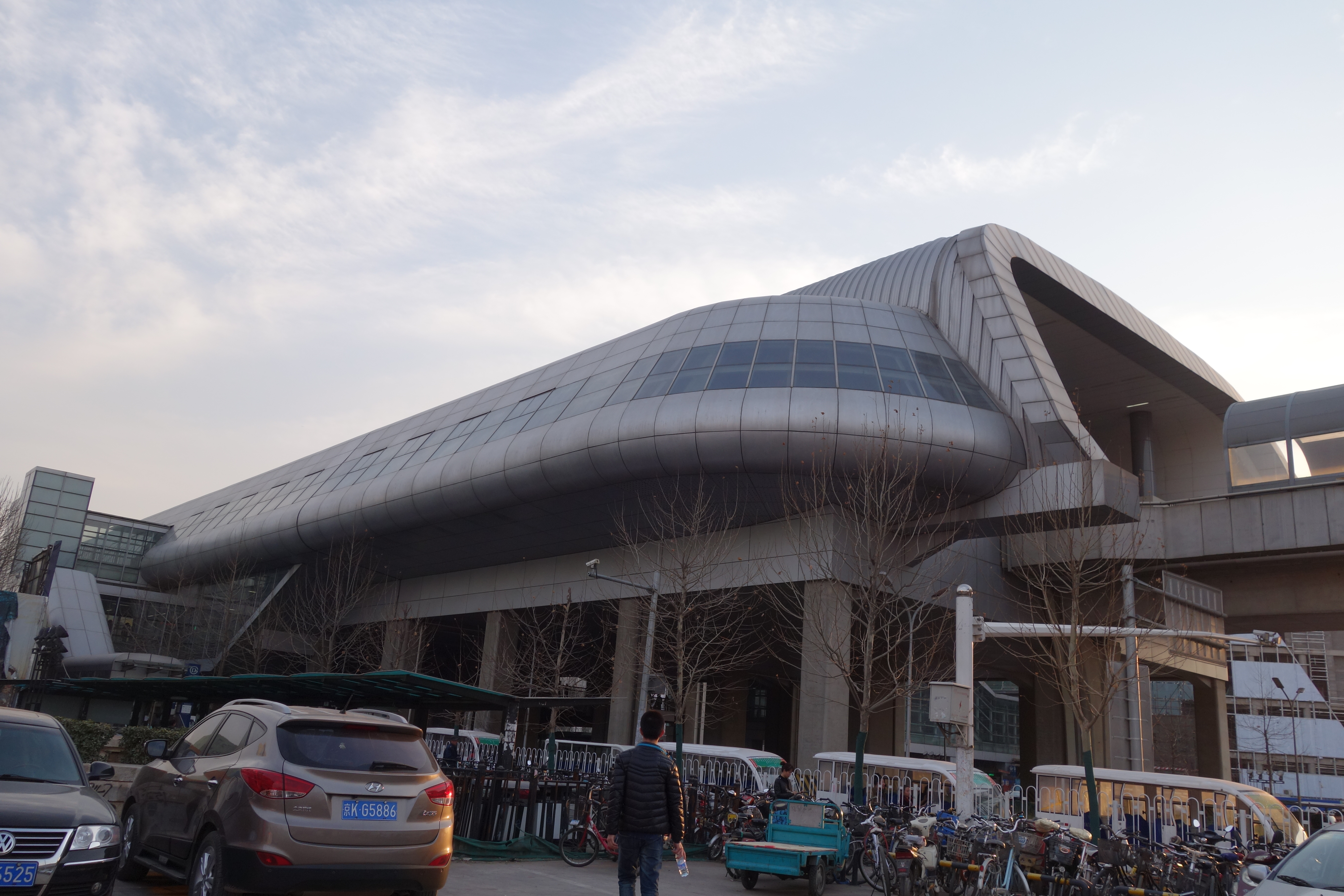 北京地铁西红门站